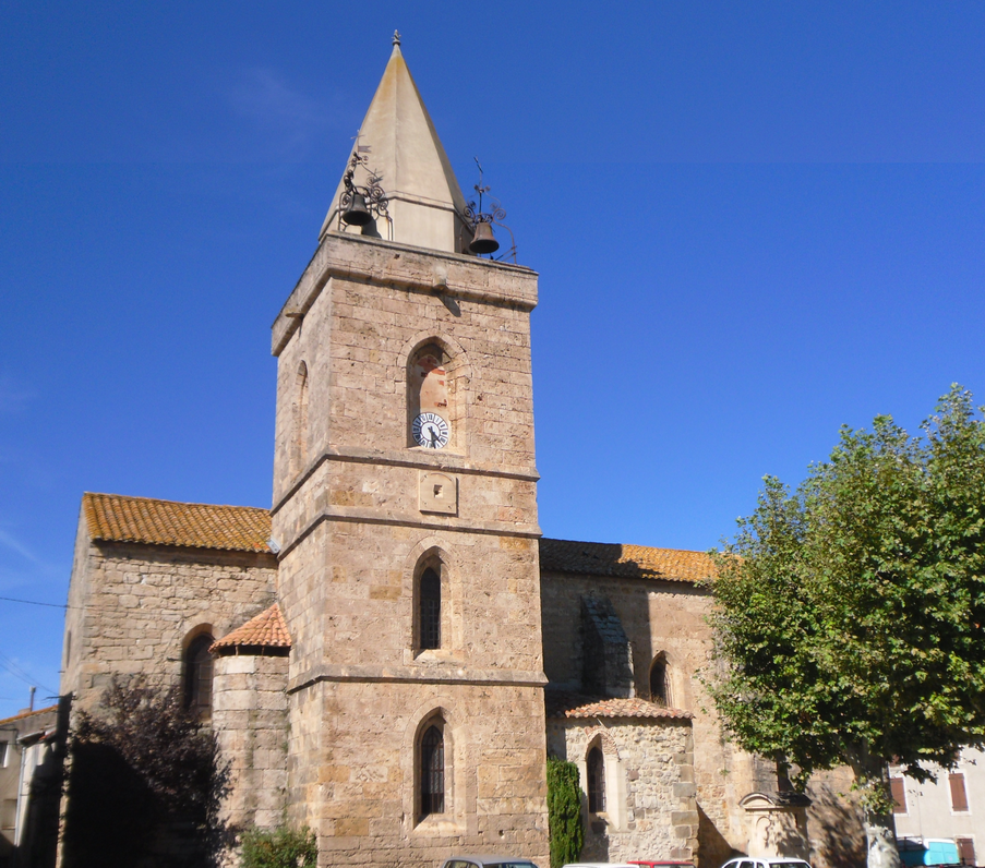 Canet d'Aude église